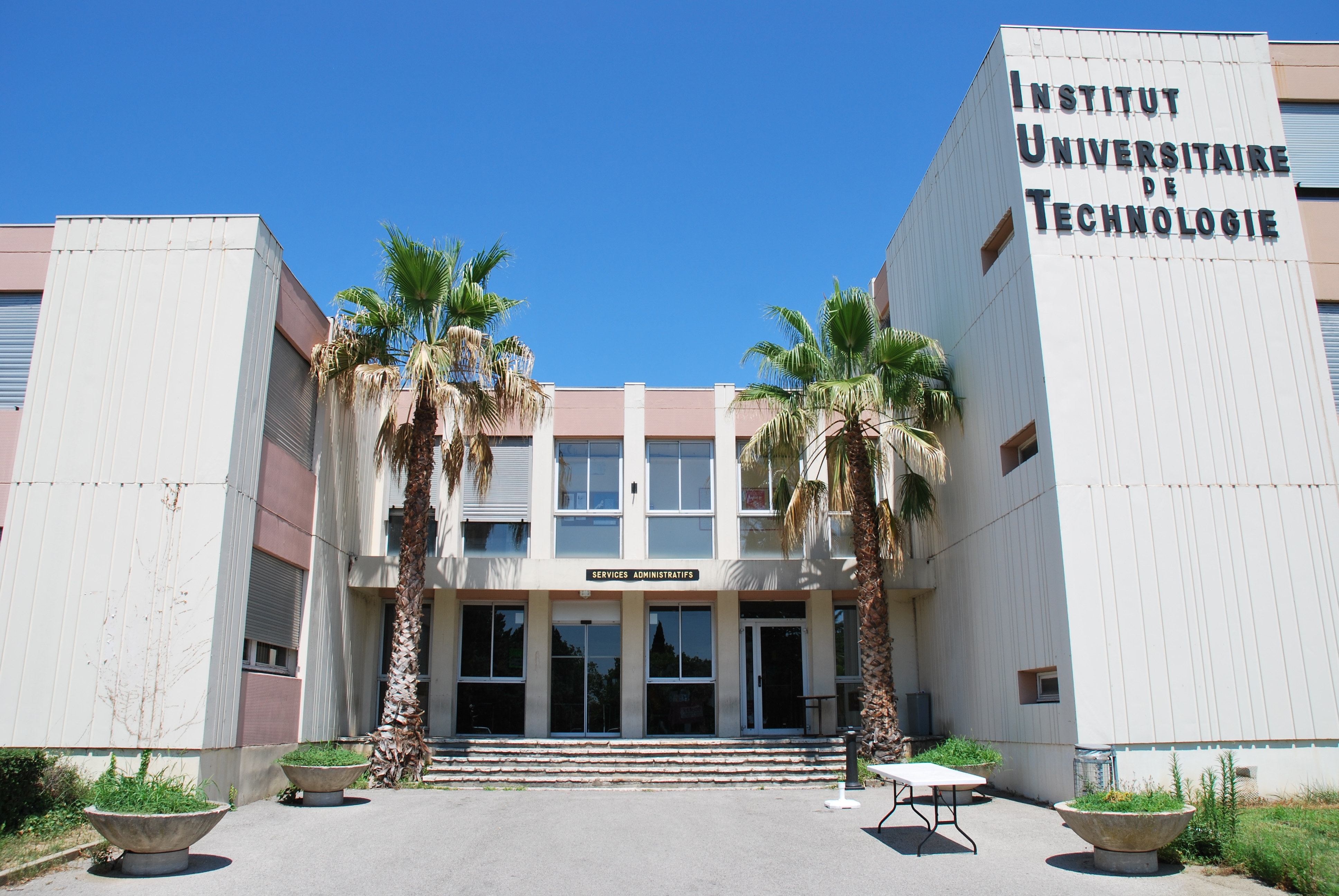 Institut Universitaire de Technologie de Nîmes - Entrée du bâtiment administratif